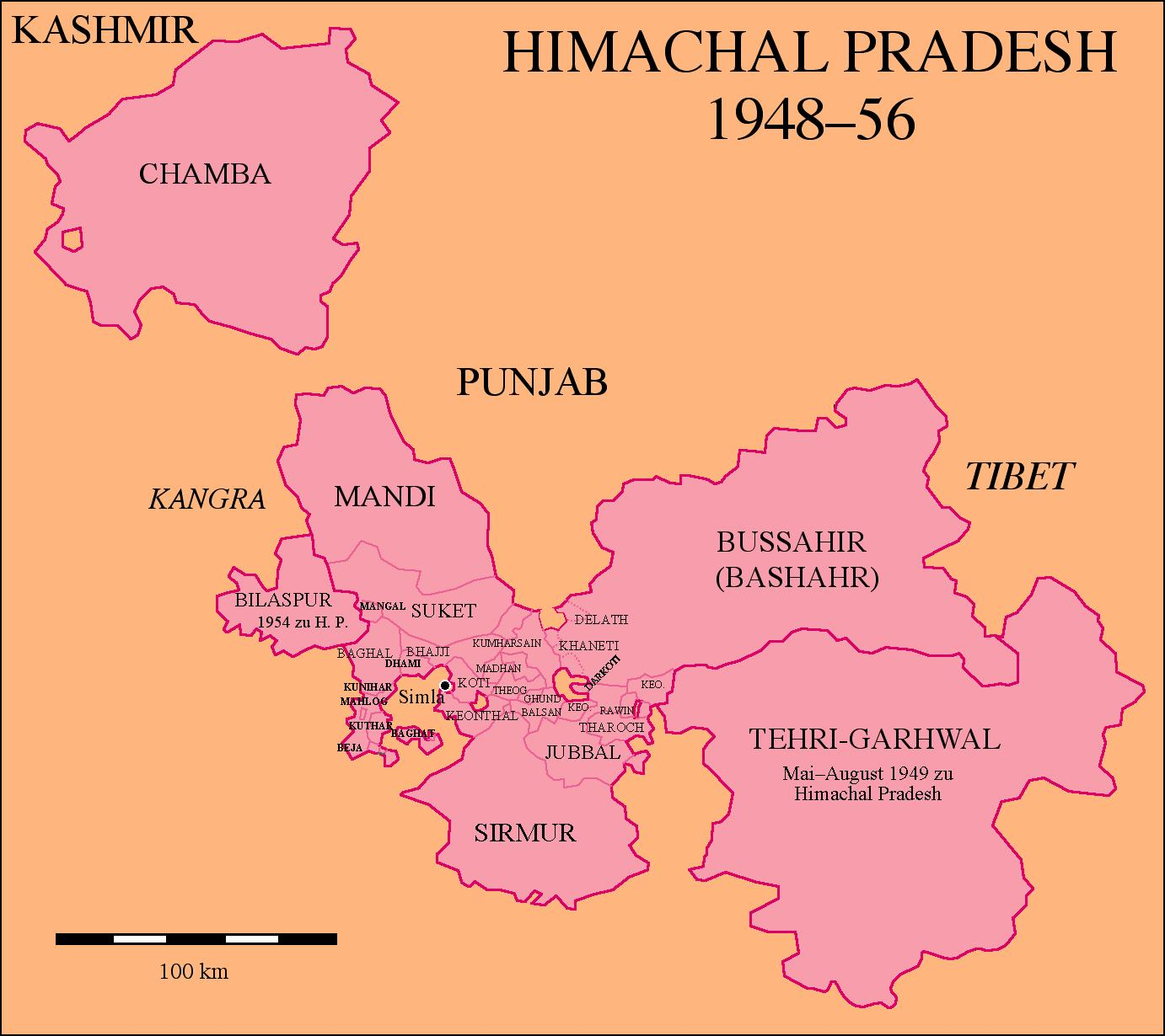 Karte von Himachal Pradesh